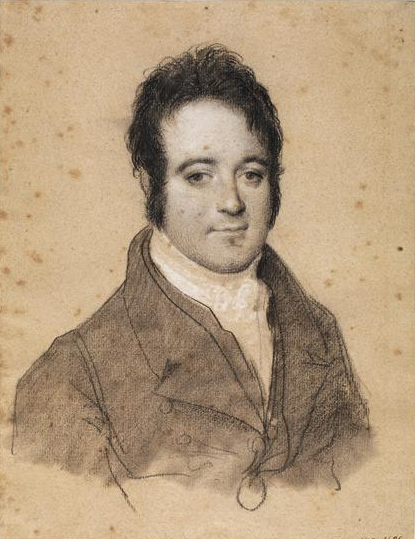 Manuel de Serpa Machado (1784-1858), Portuguese academic and member of Parliament.